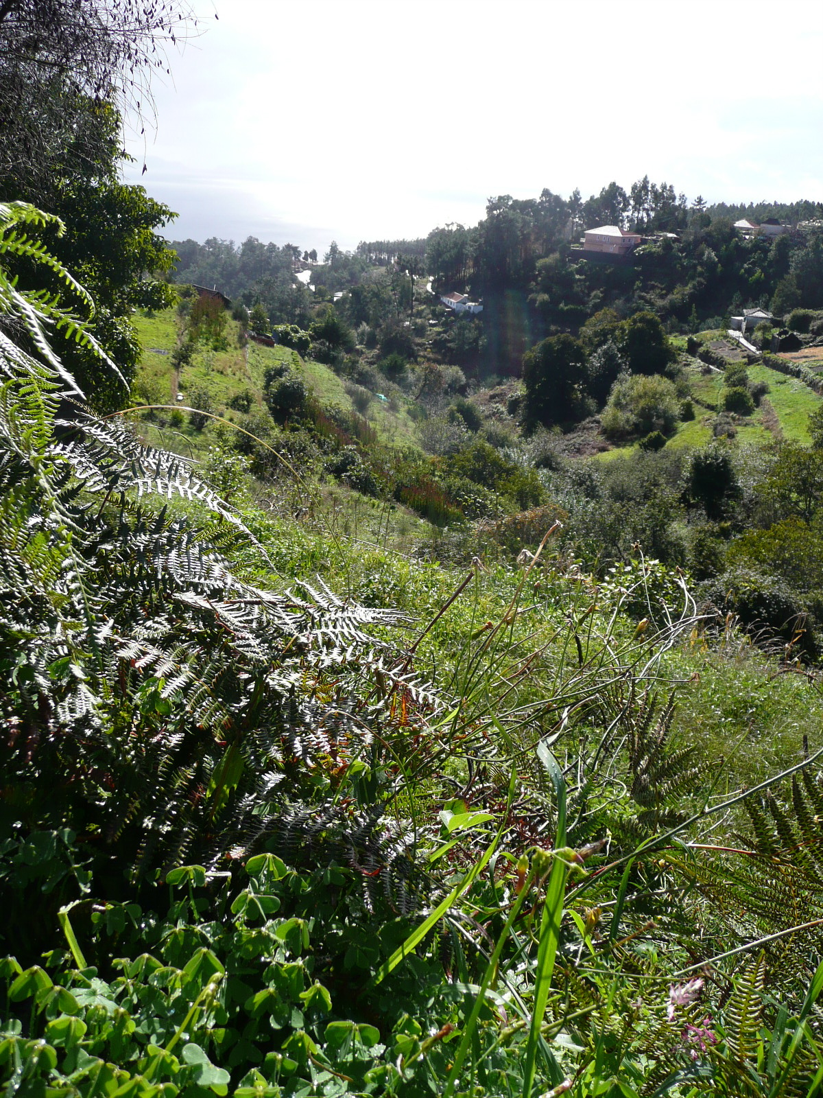 Vista da levada nos Prazeres